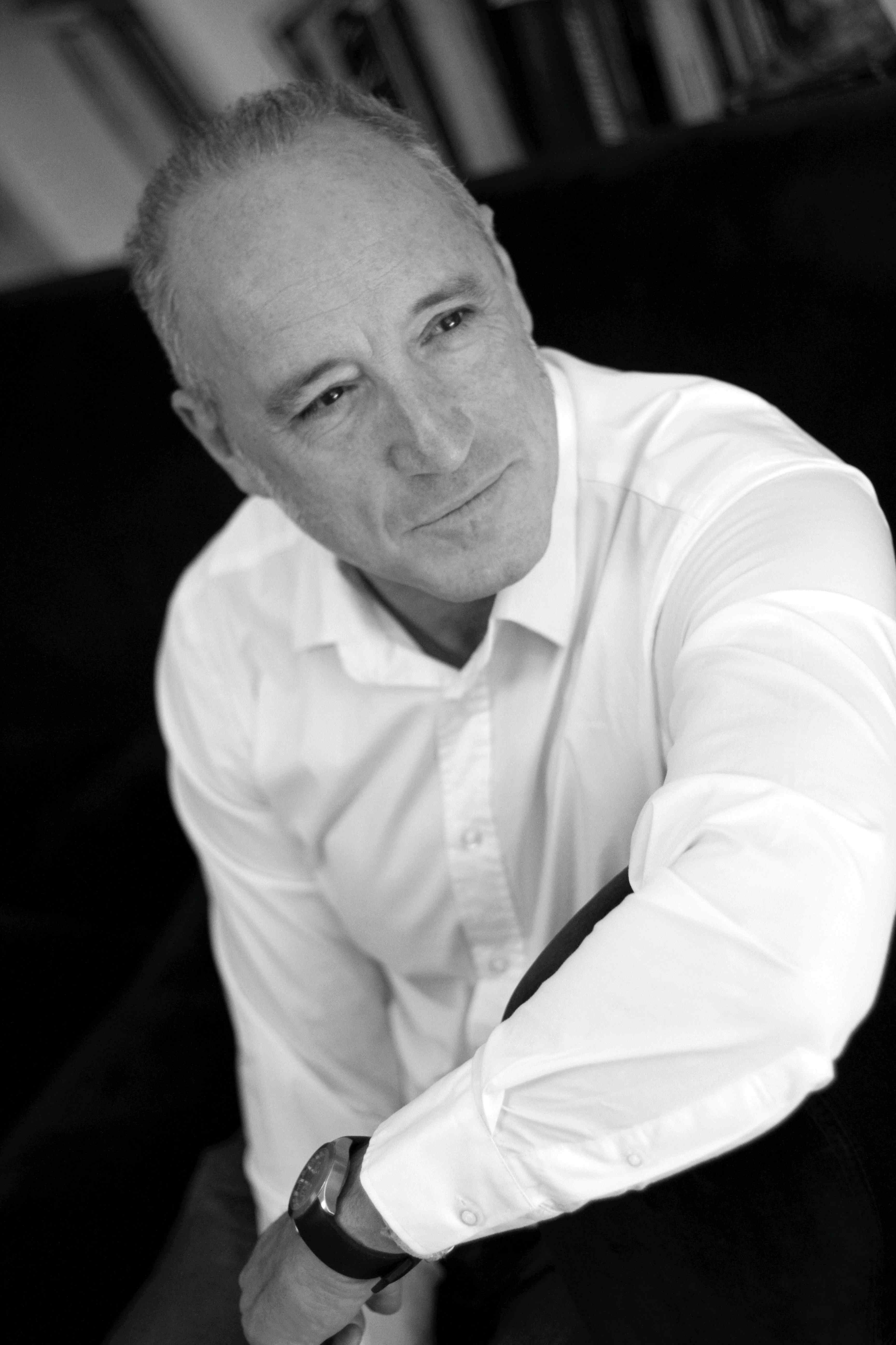 Boock Roberto Alvarez 2014